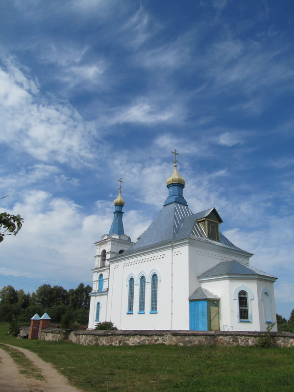 Богіна. Свята-Пакроўская царква